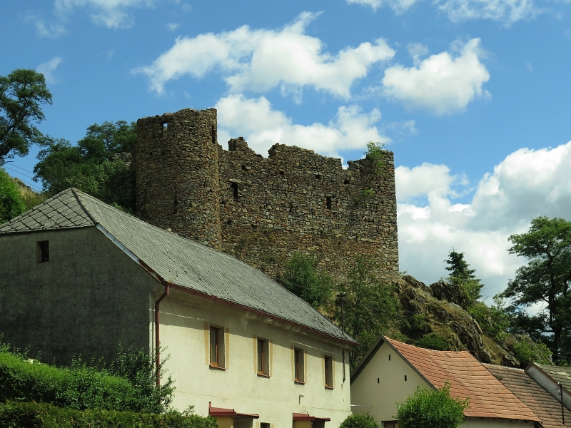 Tvrz, Zavlekov.